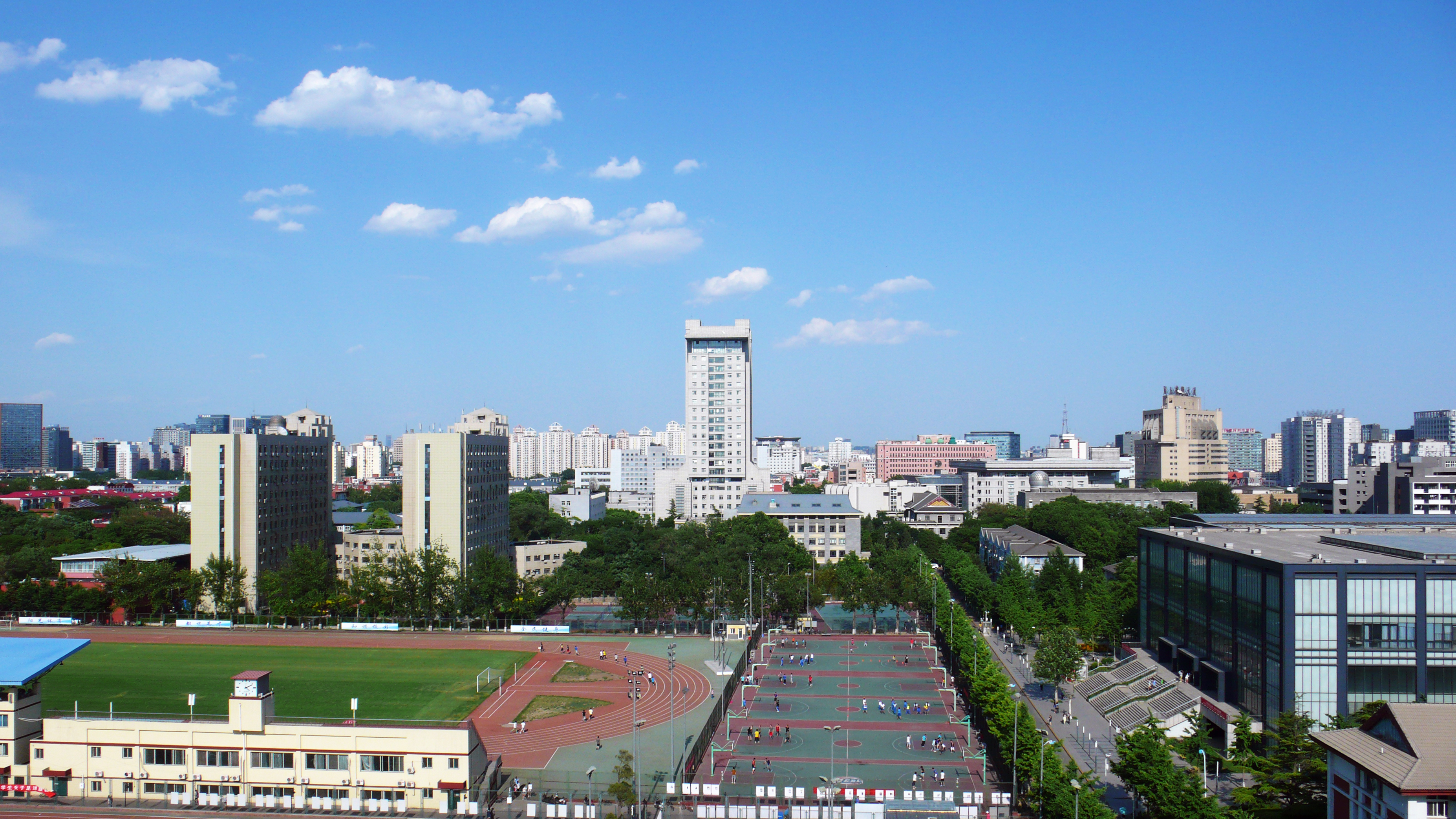 北师大俯瞰。